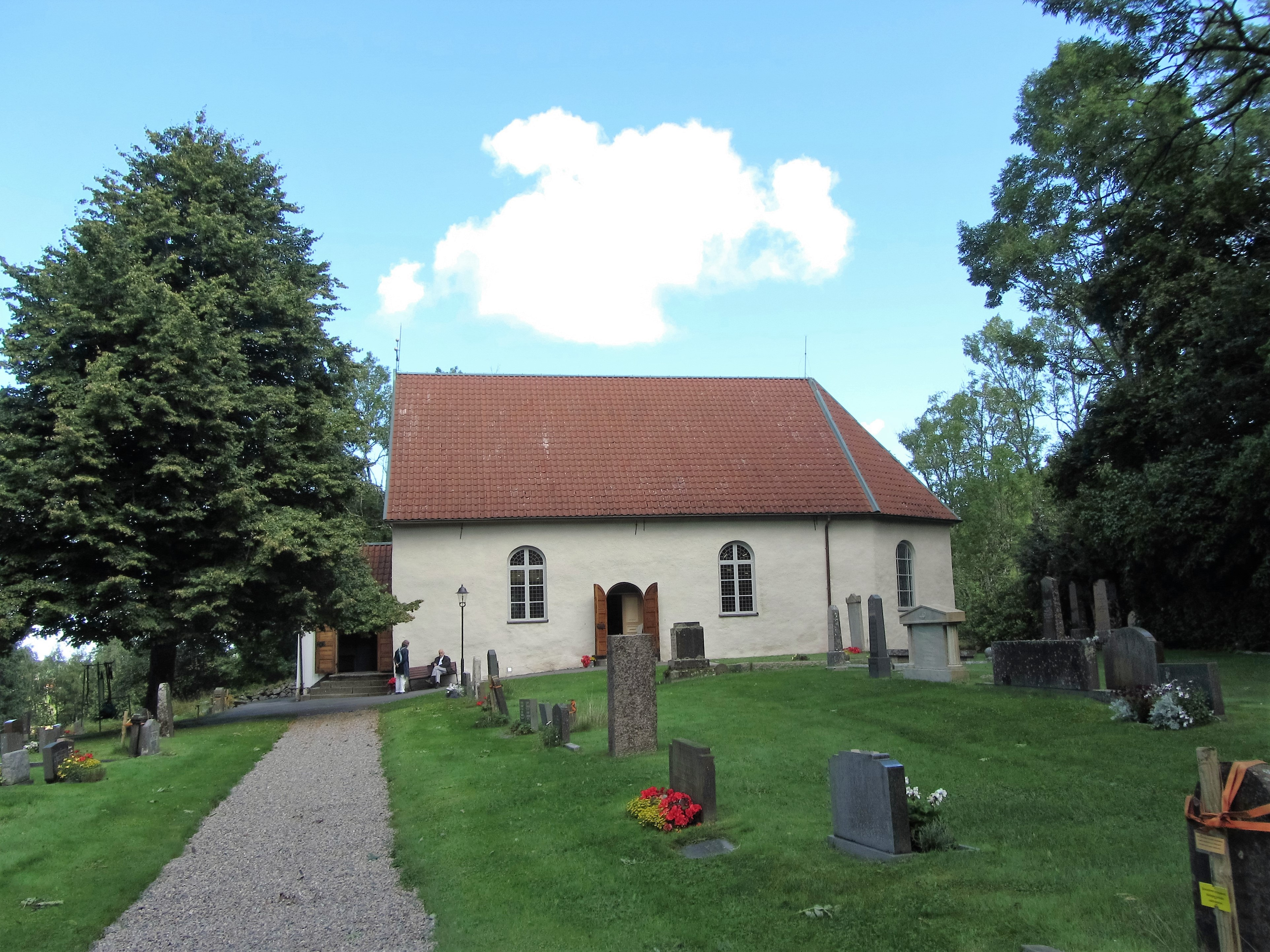 Torps kyrka och kyrkogård öster om Ellenö tätort och Ellenö kraftverk söder om Färgelanda i Dalsland.